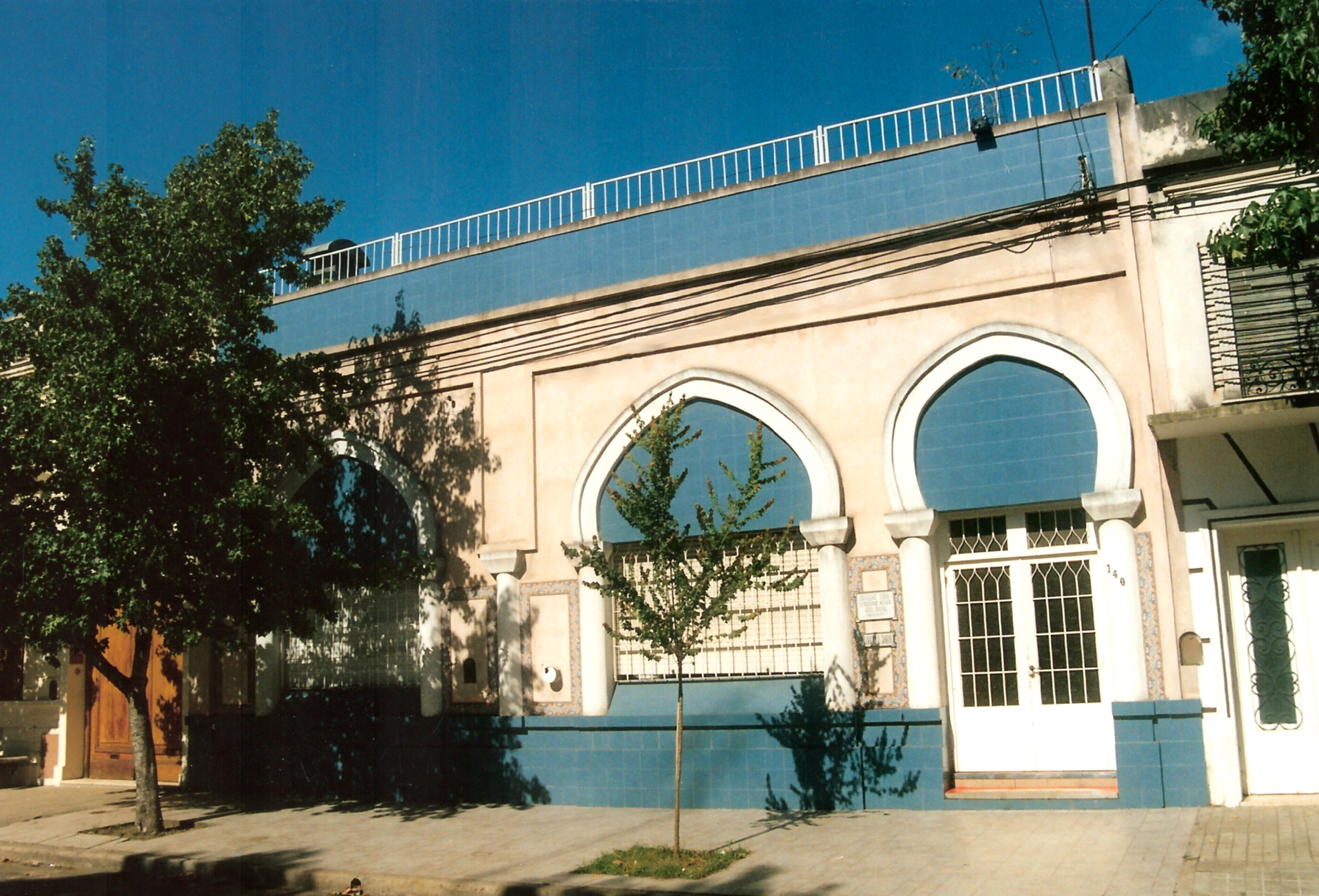 Sede de la Sociedad Siria de Junín, Argentina.